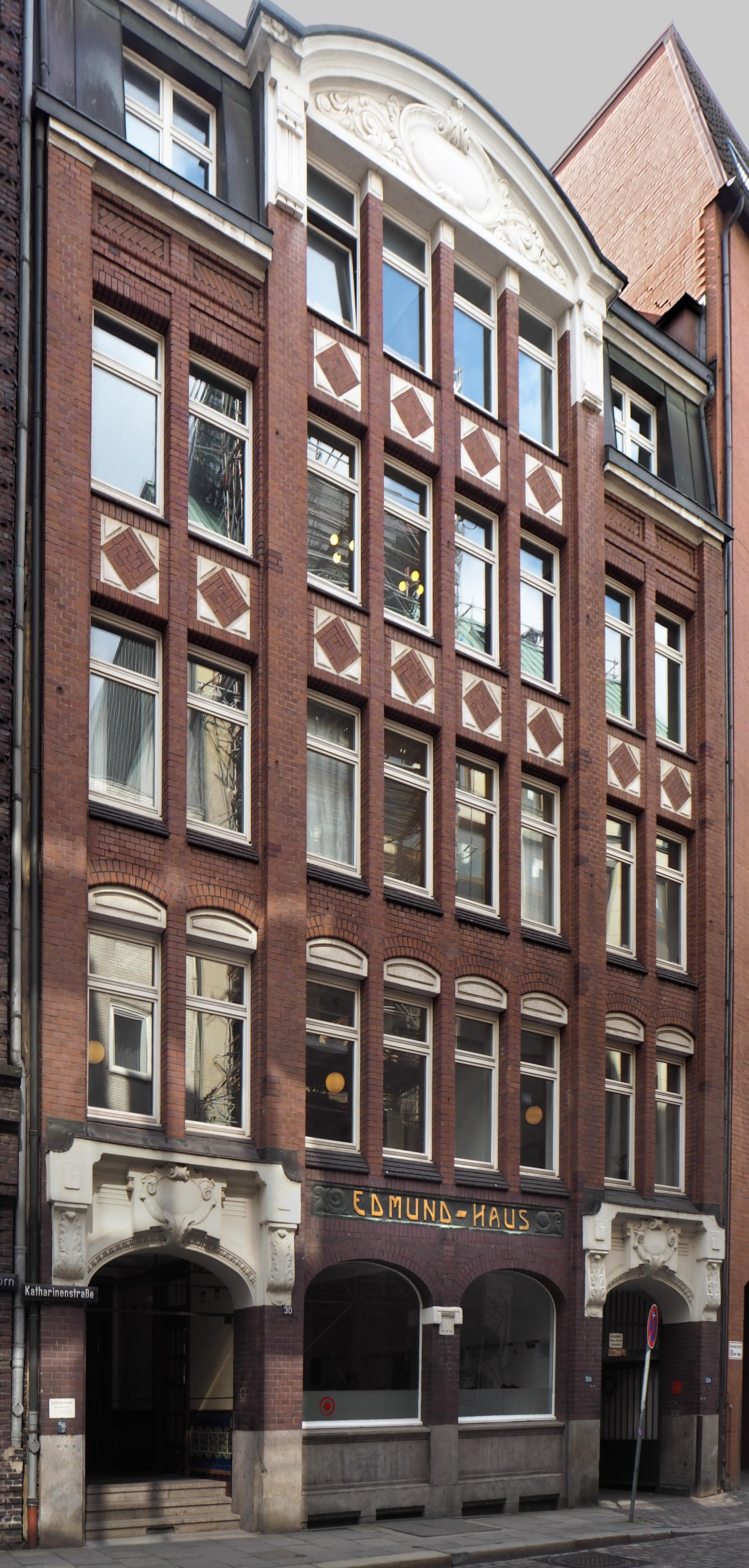 Hamburg-Altstadt, Edmund-Haus, Katharinenstr. 30 Foto: 2016 This is a photograph of an architectural monument.